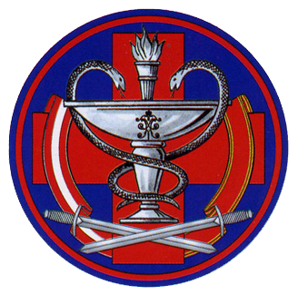 Нарукавная нашивка